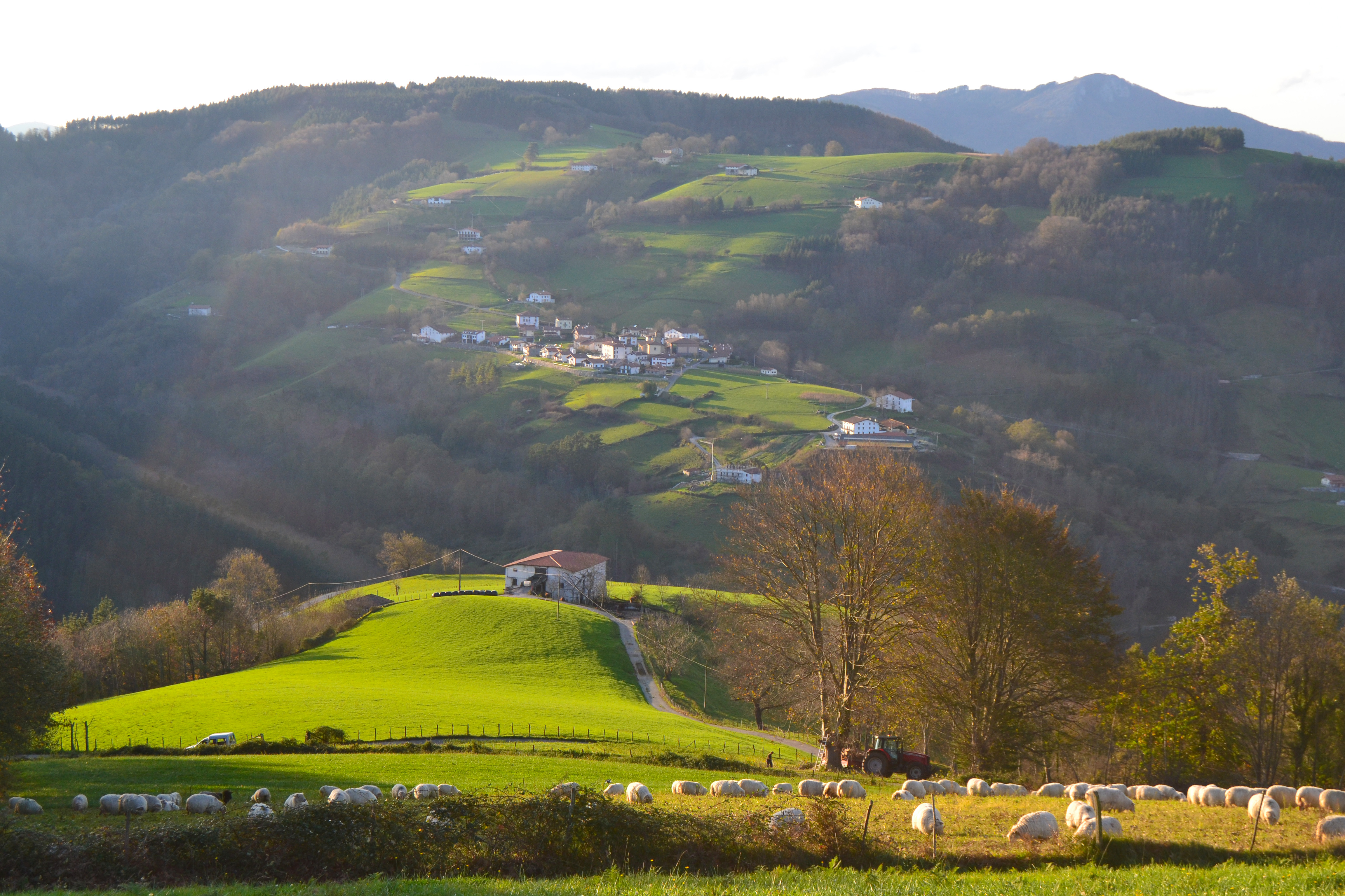 Baliarrain, Gipuzkoa. Euskal Herria. Baliarrain, Gipuzkoa. Basque Country.